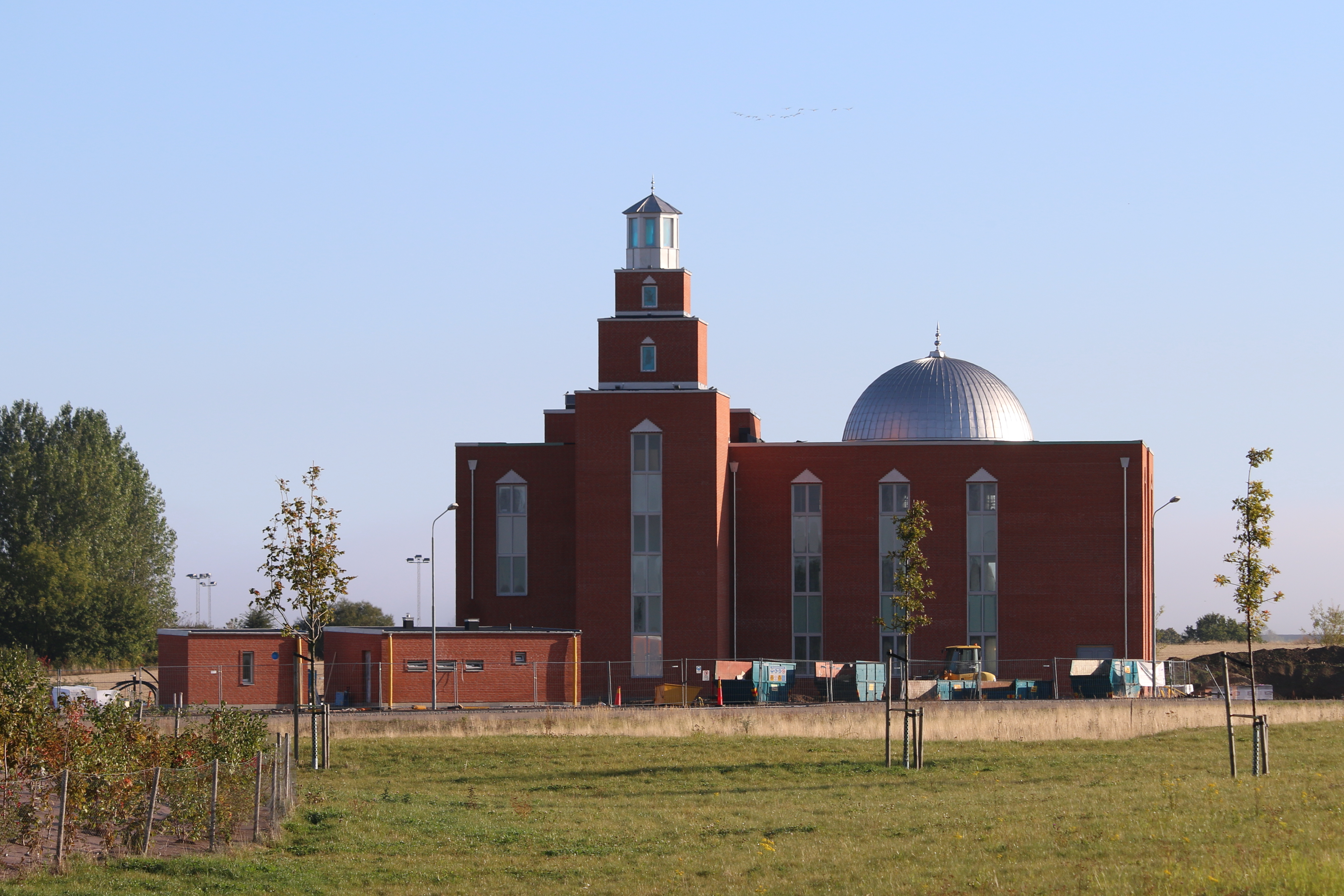 Mahmud-moskén, Malmö